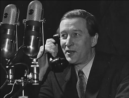 Lars Madsén